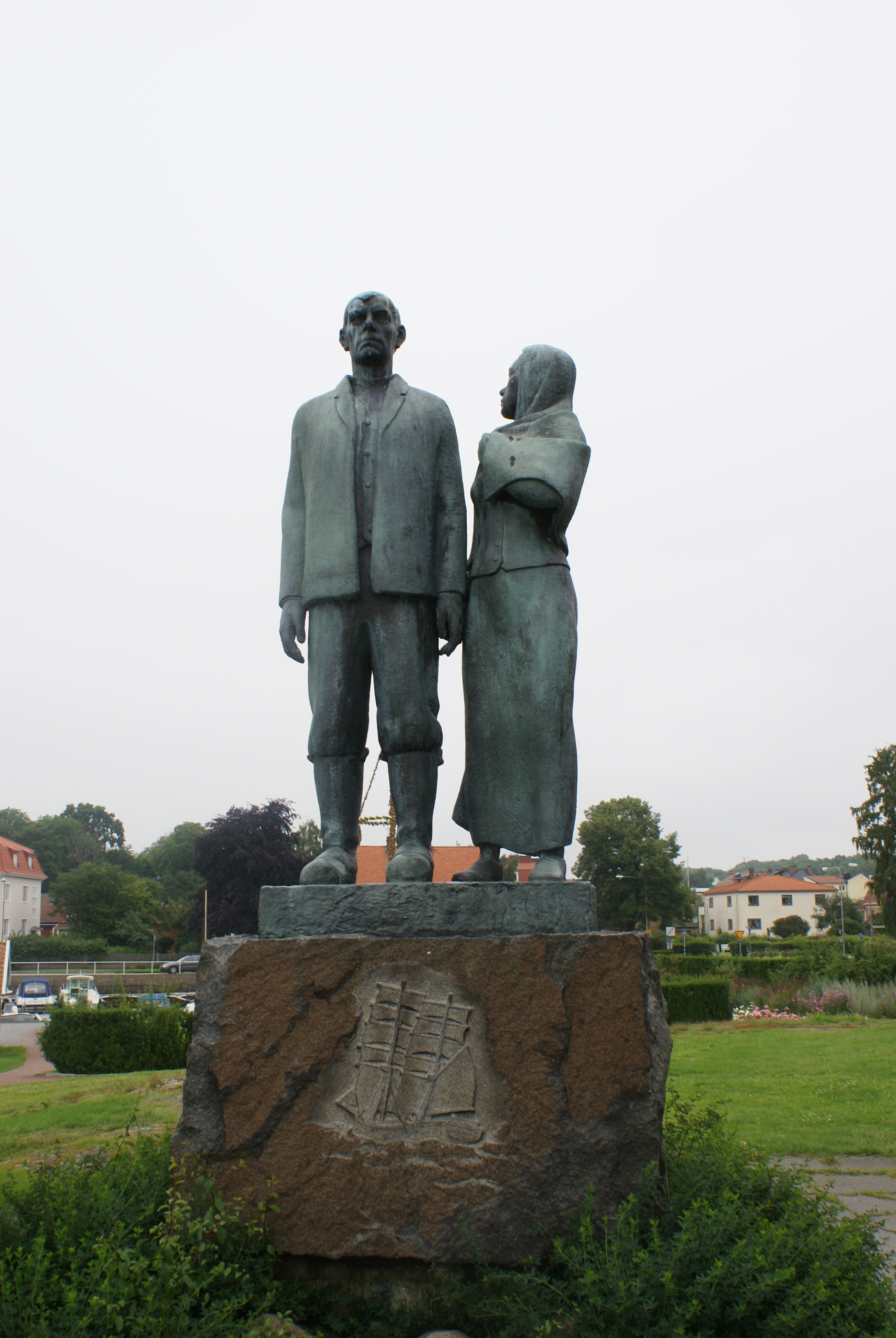 Auswandererdenkmal von Axel Olsson in Karlshamn, fotografiert im Juli 2007